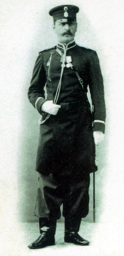 Околоточный (Надзиратель полицейского участка - "околотка"). Из серии "Типы России". Издательство "Шерер, Набгольц и Ко". 1900-е гг.